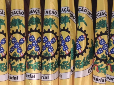 Conjunto de bandeiras da Associação Industrial Portuguesa